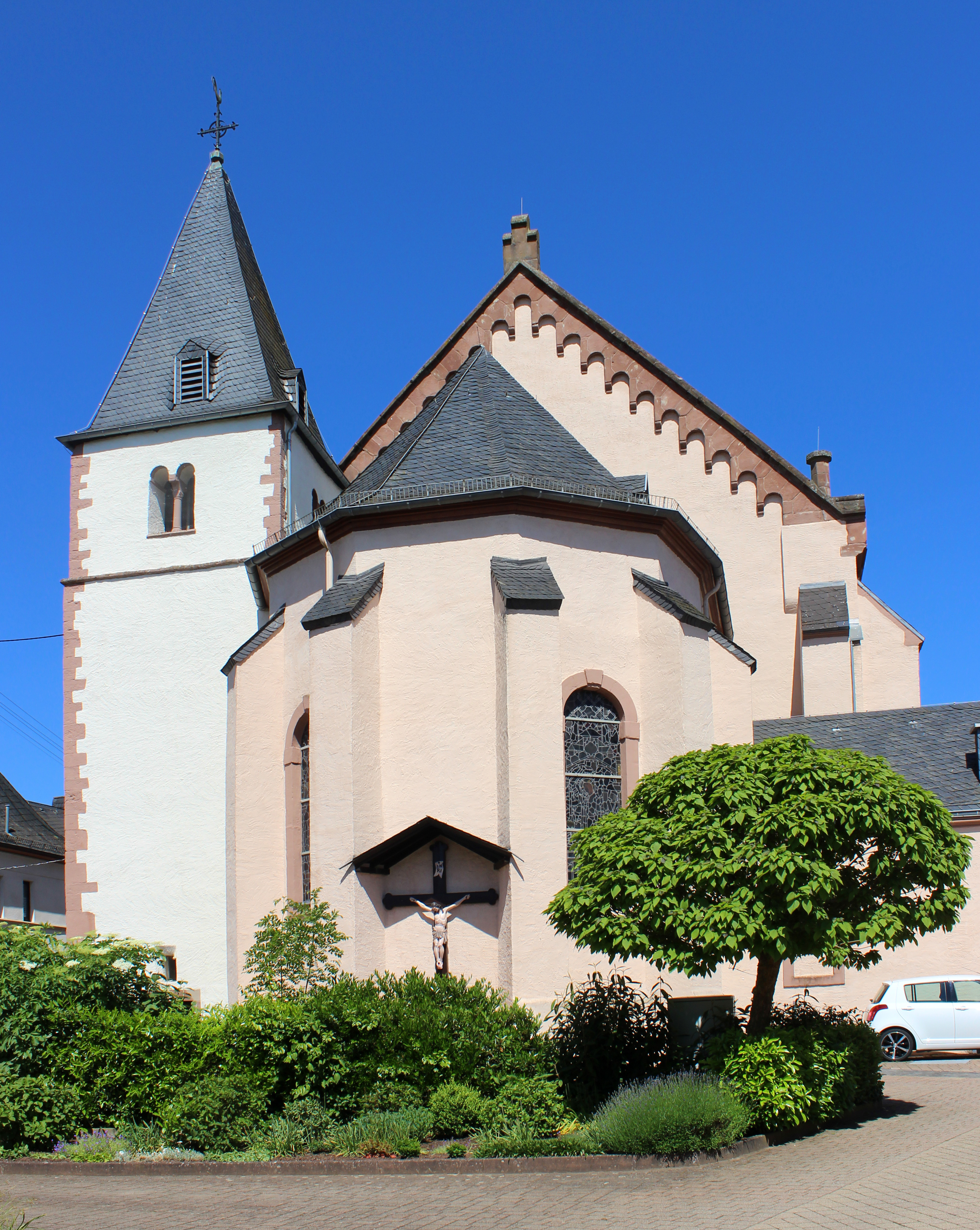 Katholische Kirche St. Martin in Wadern-Wadrill, Saarland